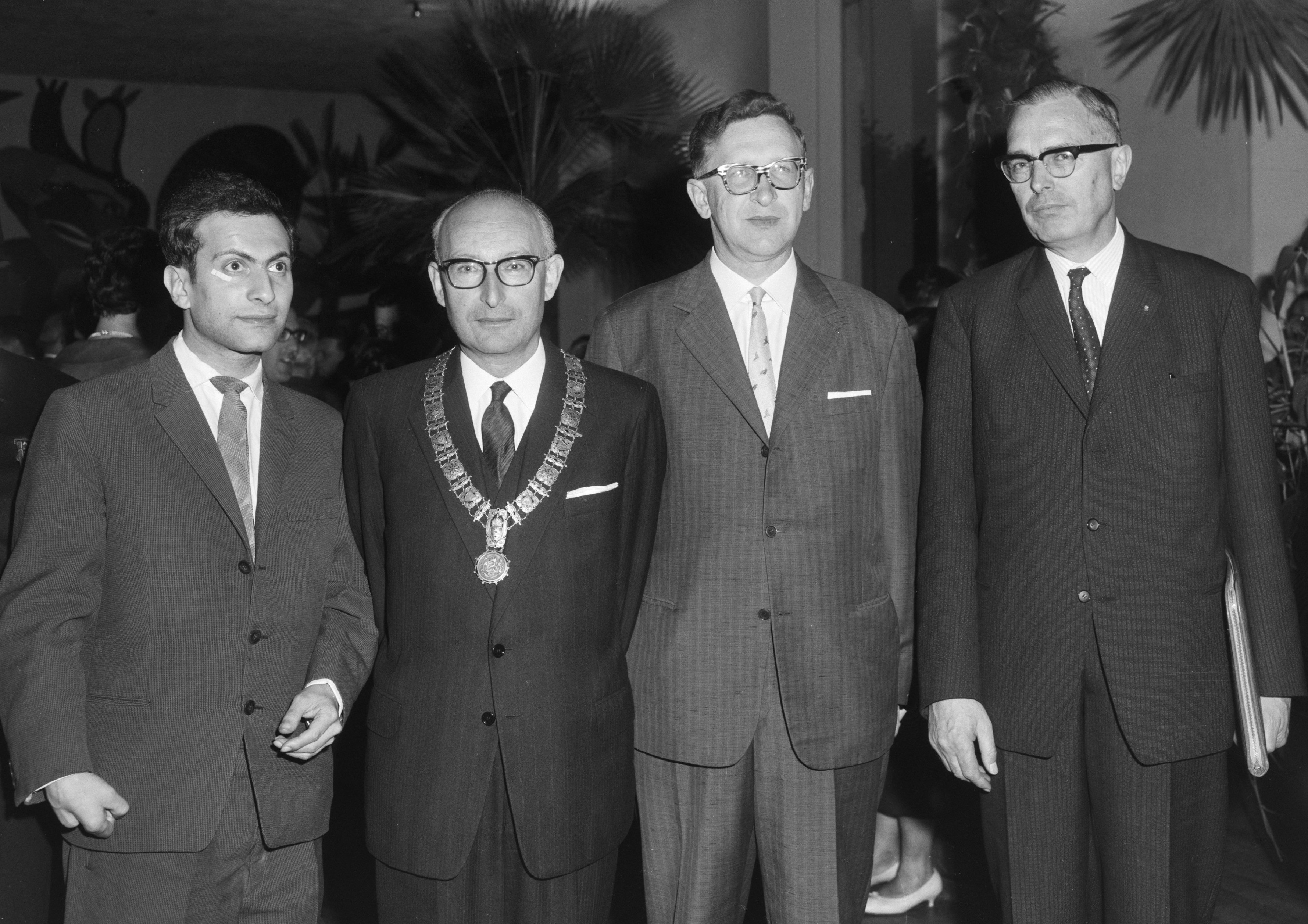 Collectie / Archief : Fotocollectie Anefo Reportage / Serie : [ onbekend ] Beschrijving : Interzonaal Fide schaaktoernooi officieel geopend door wethouder mr. R. Van de Bergh in Stedelijk Museum v.l.n.r. Mikhail Tal , wethouder Van de Bergh $ Datum : 19 mei 1964 Trefwoorden : SCHAAKTOURNOOIEN Persoonsnaam : mr. R. van de Bergh Fotograaf : Bilsen, Joop van / Anefo Auteursrechthebbende : Nationaal Archief Materiaalsoort : Negatief (zwart/wit) Nummer archiefinventaris : bekijk toegang 2.24.01.04 Bestanddeelnummer : 916-4462